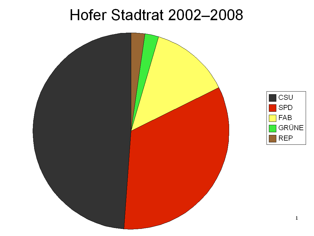 Sitzverteilung im Hofer Stadtrat 2002-2008